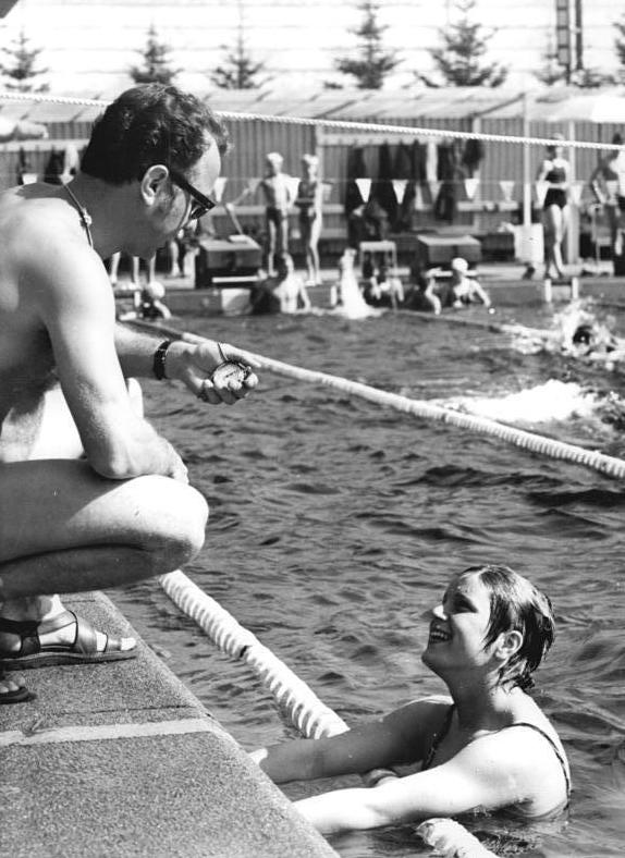 Helga Lindner ADN-ZB Mittelstädt 10-7-71-Rostock:XXIV.DDR-Meisterschaften im Sportschwimmen (3.Tag)-Die Favoritin für die Schmetterlingsstrecken Helga Lindner (SC Karl-Marx-Stadt) mit Trainer Wolfgang Fricke. Die Europameisterin und Europarekordhalterin hat bis zum heutigen Finale über 200 m bisher schon zwölf Meistertitel in ihrem Besitz. (Zehn Einzel und zwei Staffel)